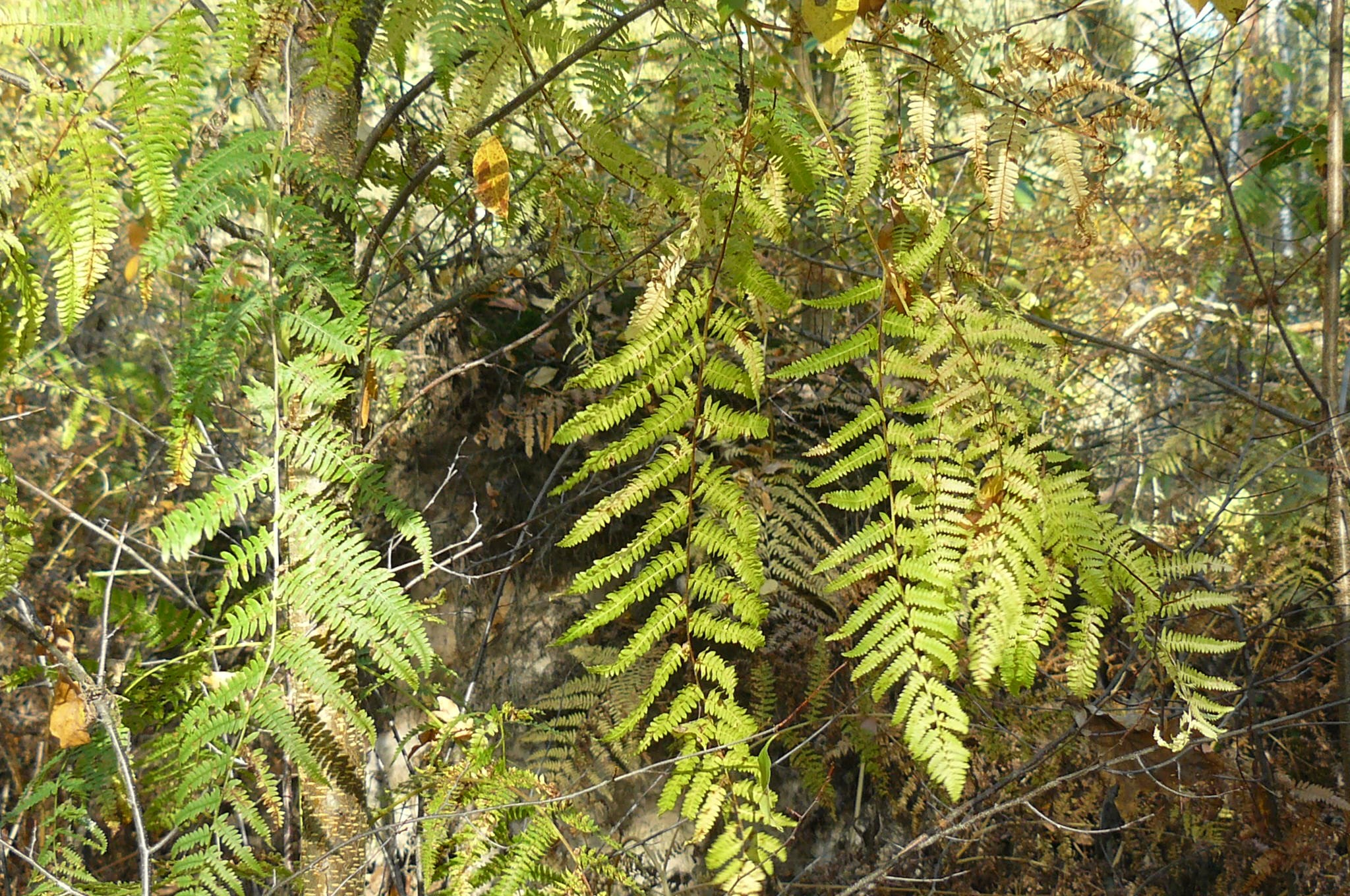 Rezerwat przyrody Baszków - Obszar Chronionego Krajobrazu Dąbrowy Krotoszyńskie i Baszków-Rochy (okolice Baszkowa).